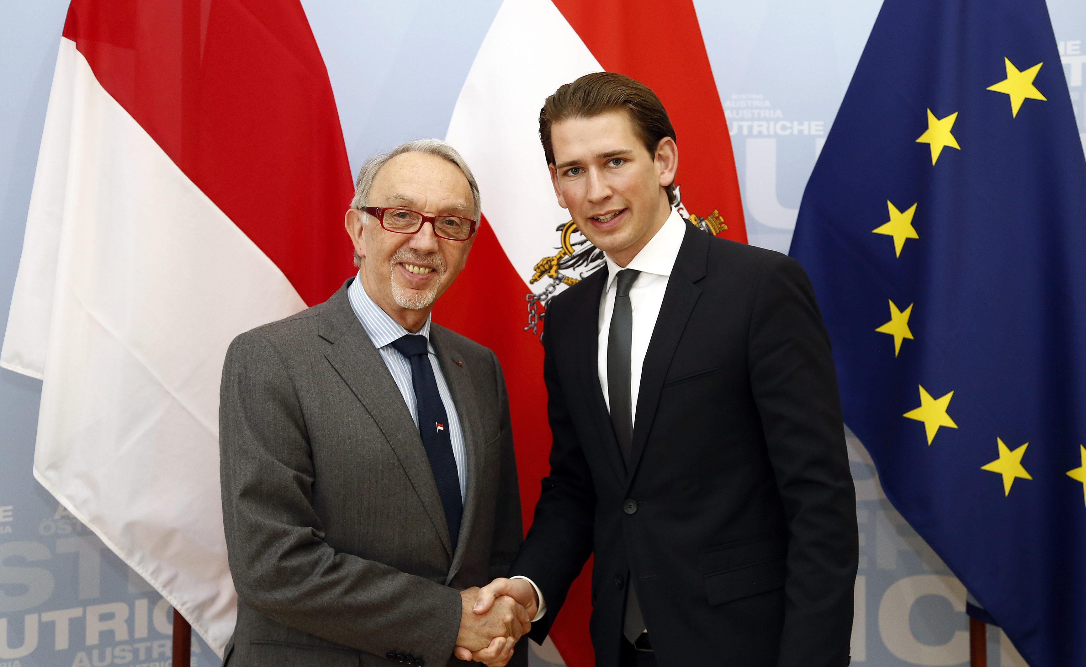 Ministerkomitee des Europarates. Außenminister Sebastian Kurz trifft den Außenminister von Monaco José Badia. 05.05.2014, Foto: Dragan Tatic